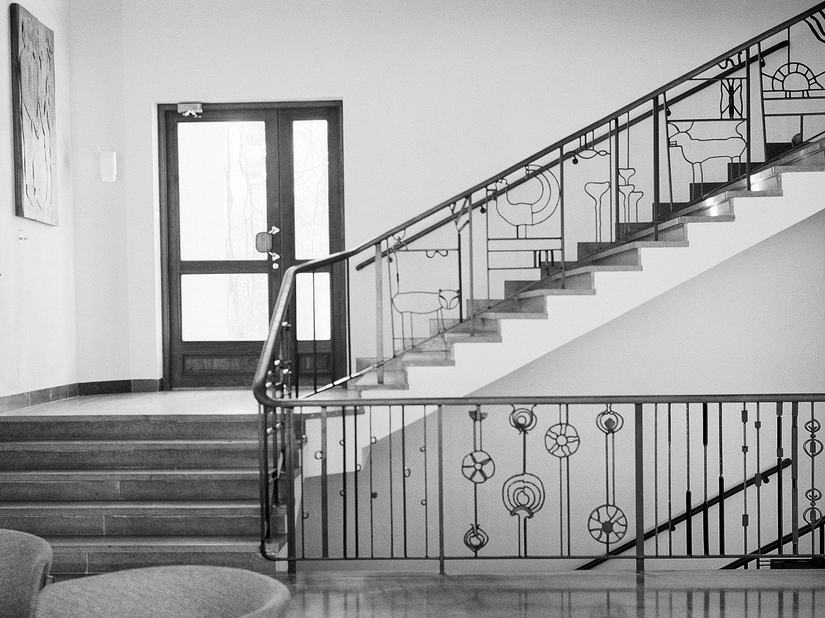 Vår Gård, trapphall med trappräcke formgiven av Christer Sjögren